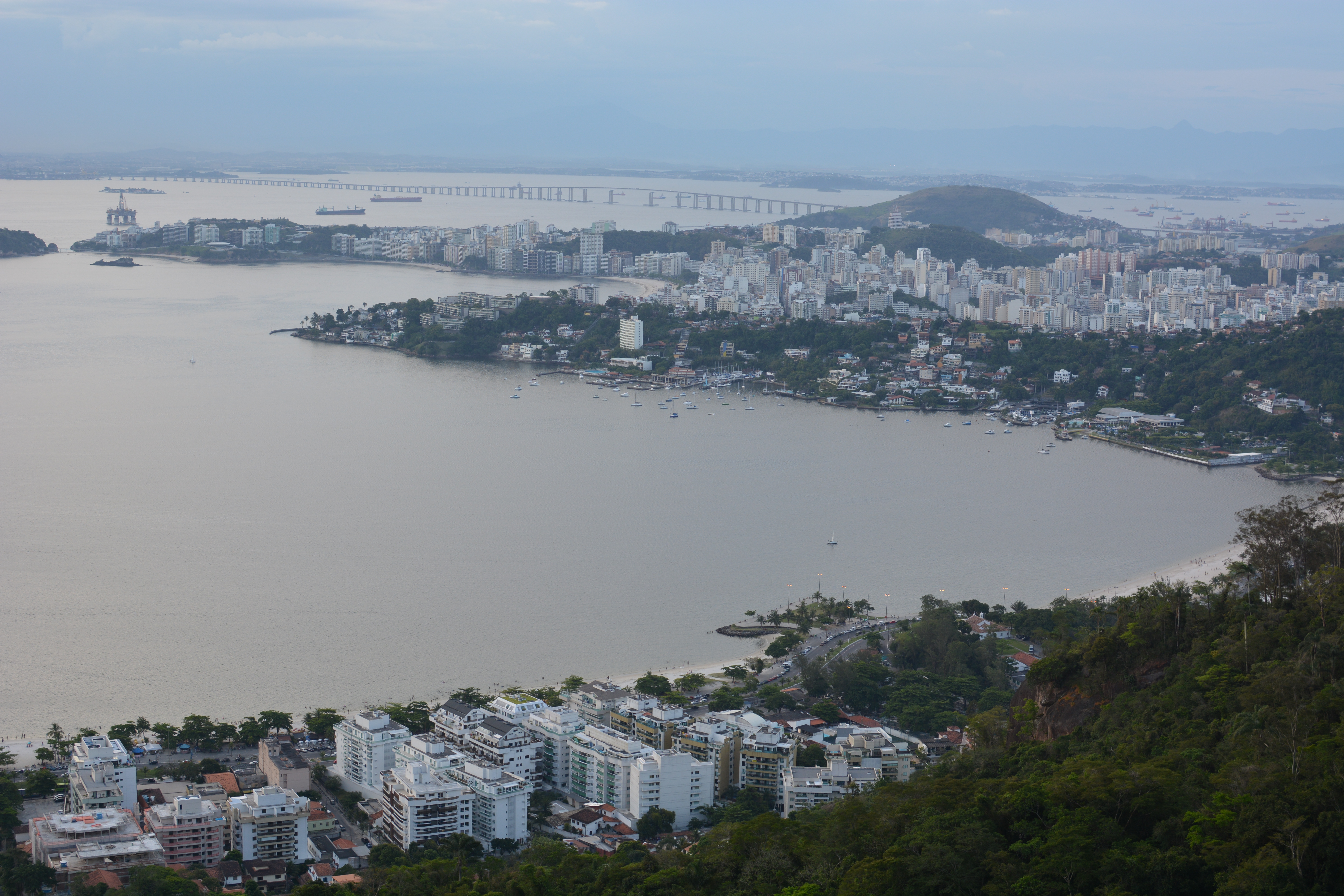 Cidade de Niterói vista do alto do Parque da Cidade com a ponte Rio Niterói ao fundo